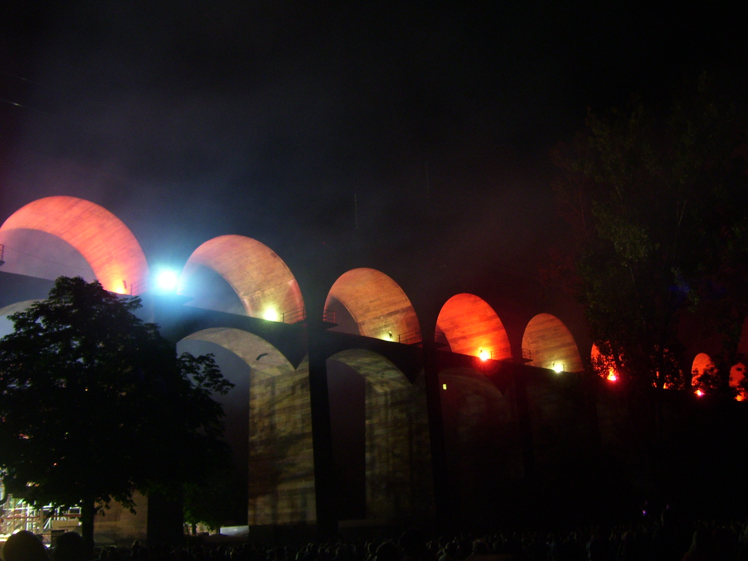 Illumination des Bietigheimer Viadukts beim Feuerwerk auf dem Pferdemarkt am 2.9.2007